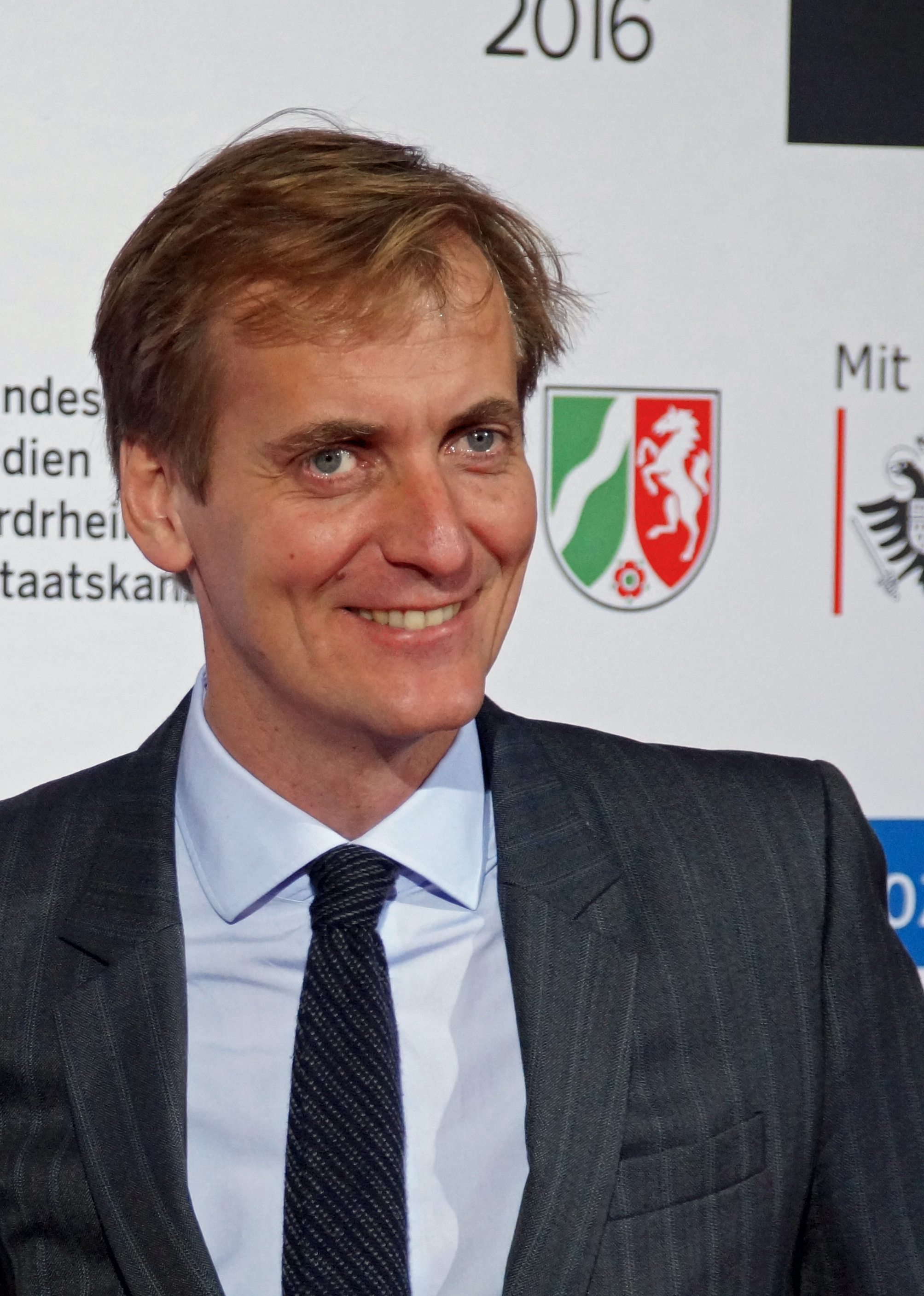 Lars Kraume (Regisseur) Deutsche Akademie für Fernsehen - Symposium und Preisverleihung 2015 in Köln